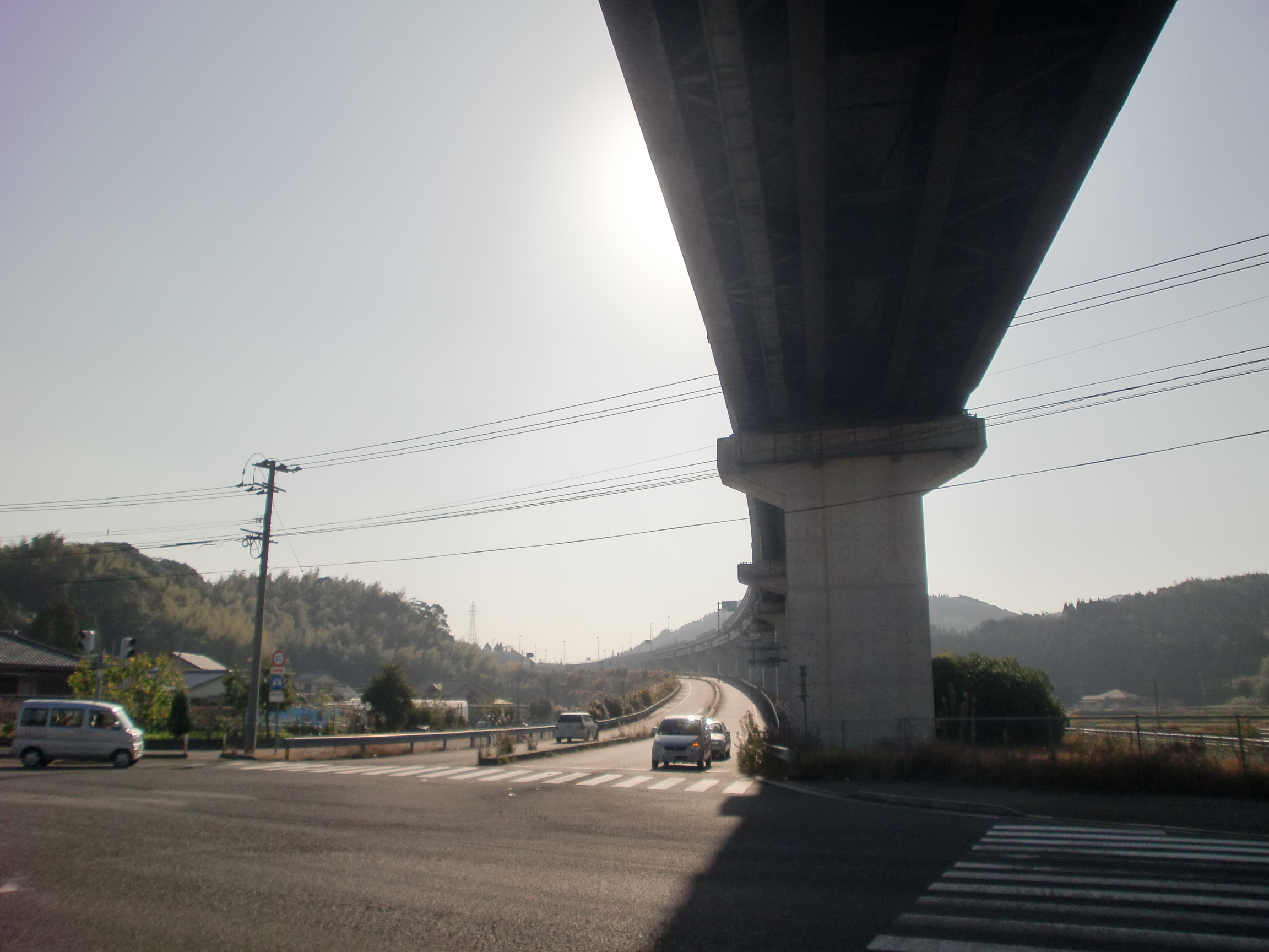 南九州西回り自動車道市来インターチェンジの外観。